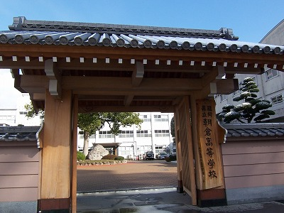 福岡県立朝倉高等学校100周年記念で創設された校門。